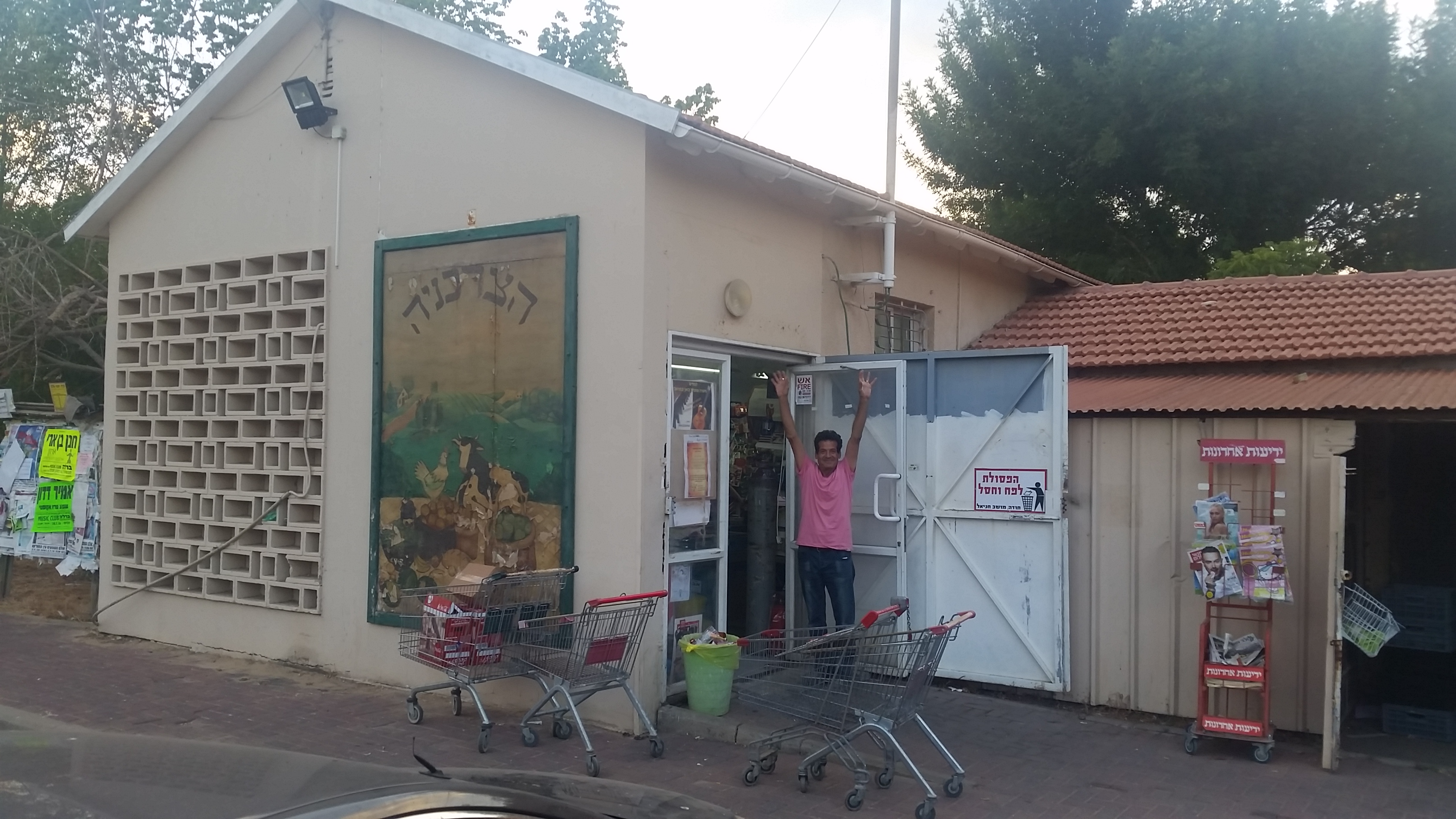 הצרכניה